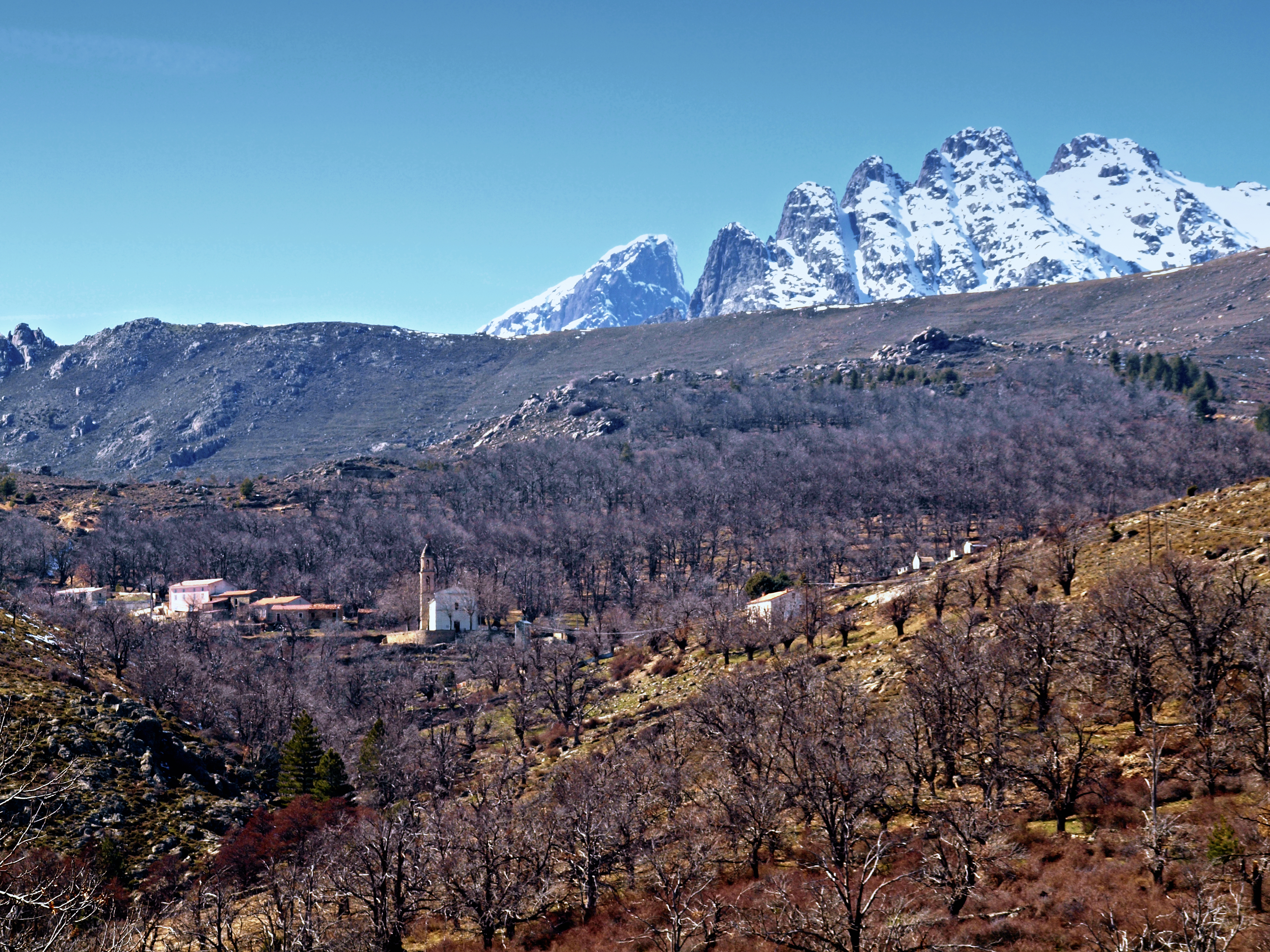 Lozzi (Corsica) - Poggio-di-Lozzi et I Cinque Frati